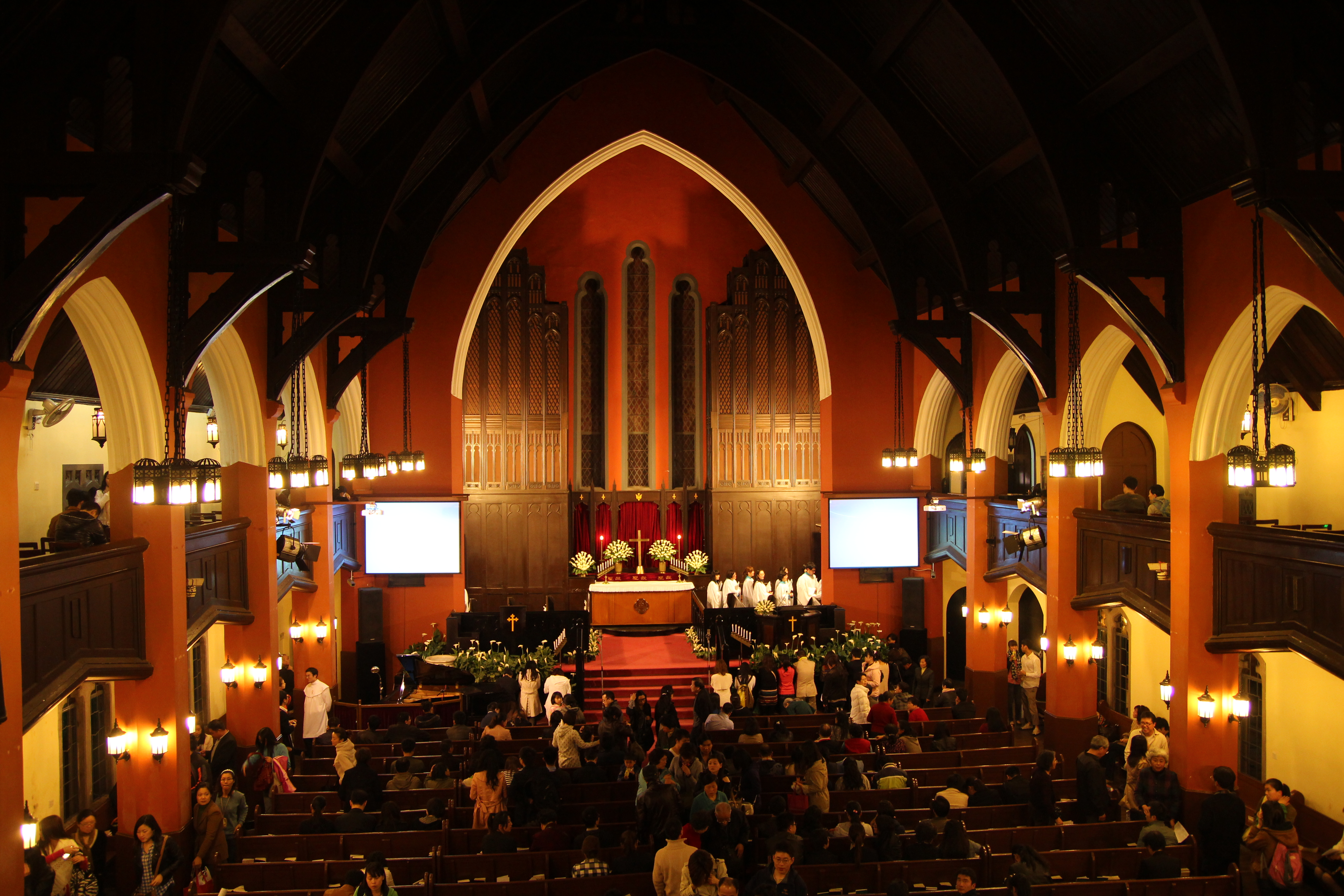 中文（中国大陆）: 上海国际礼拜堂内景